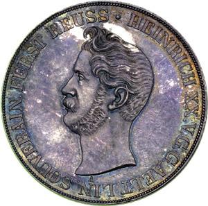 Hendrik XX van Reuss oudere linie - scan van een oude munt